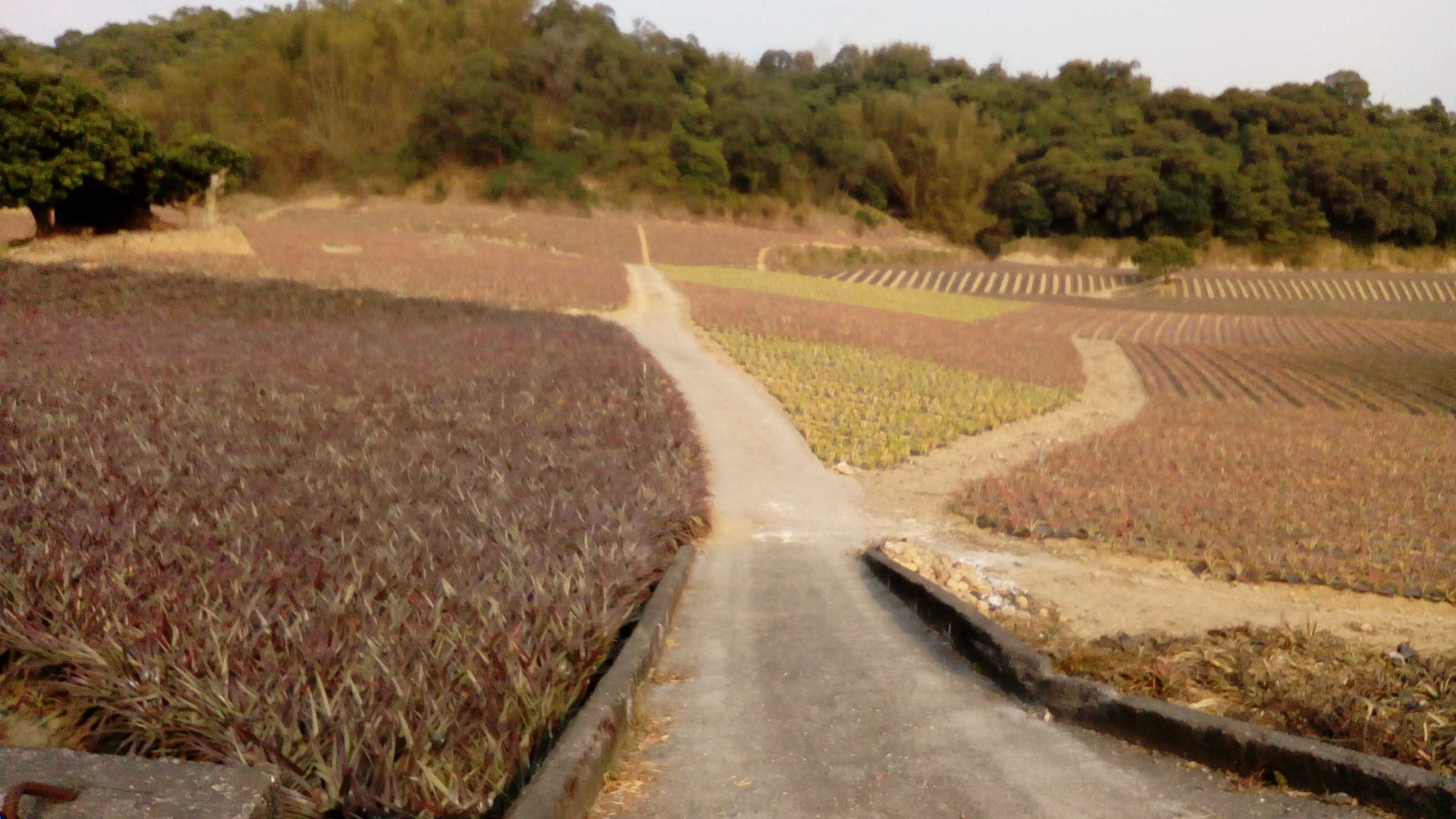 於186縣道上所攝 田地位置位於和山里 因地勢低窪 由公路往下看略成一迷你谷地 搭配多色混雜的鳳梨葉 相關壯觀